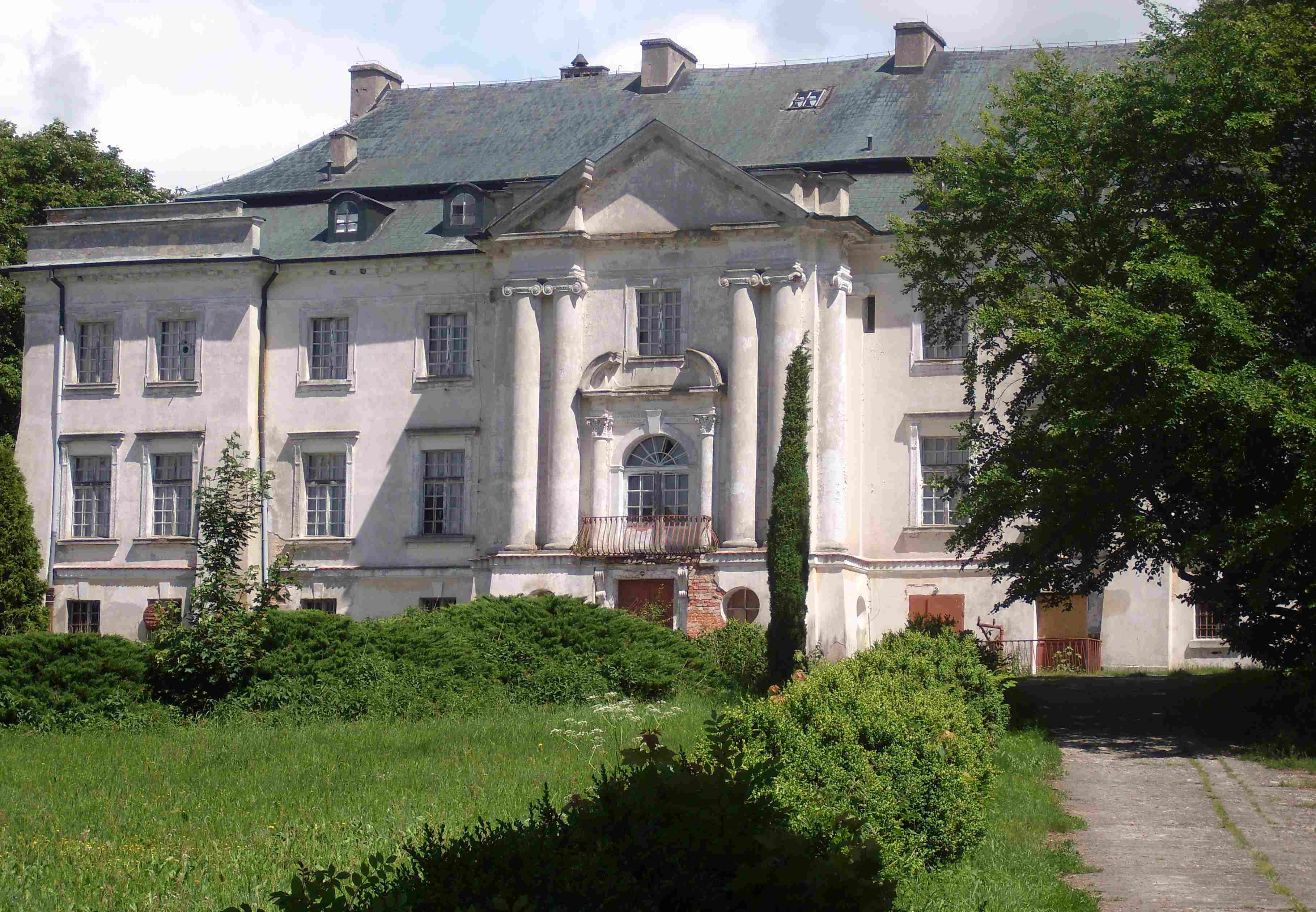 Komierowo - zespół pałacowy, XIX/XX: pałac, 1924-1929 (zabytek nr A/214/1-4)